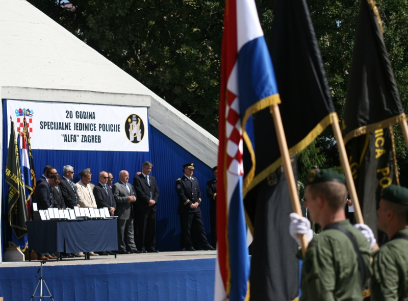 Dvadeseta obljetnica redarstvene postrojbe Alfa